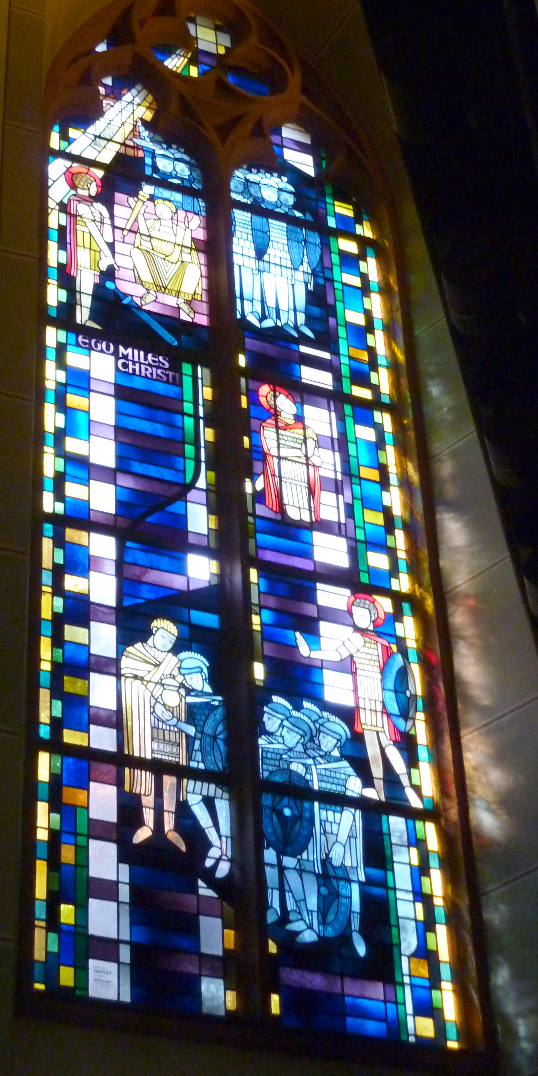 Bleiglasfenster der katholischen Pfarrkirche St. Martinus in Kirchheim, Darstellung Miles christianus, Entwurf: Heinrich Seepolt (1972), Ausführung: Glasmalerei Oidtmann (siehe Freunde und Förderer des Stadtmuseums e. V. (Hrsg.): Die Kirchen und Kapellen in Euskirchen. Euskirchen 2006, S. 71, ISBN 3-00-019035-X)